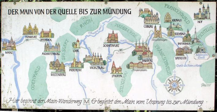 Main-Wanderweg, Tafel an der Weißmainquelle